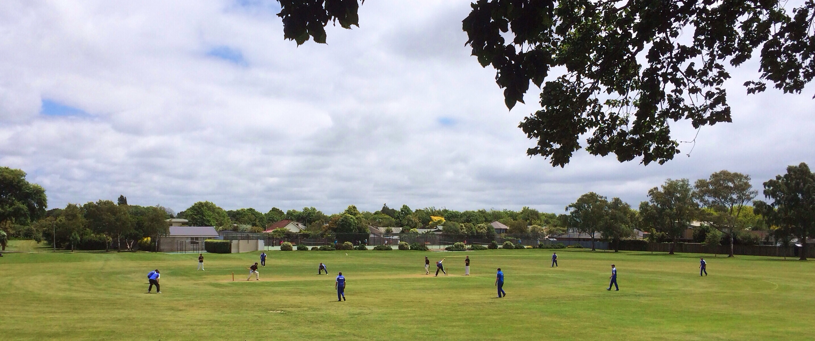 Cricket match, Beckenham Park, Christchurch, New Zealand.